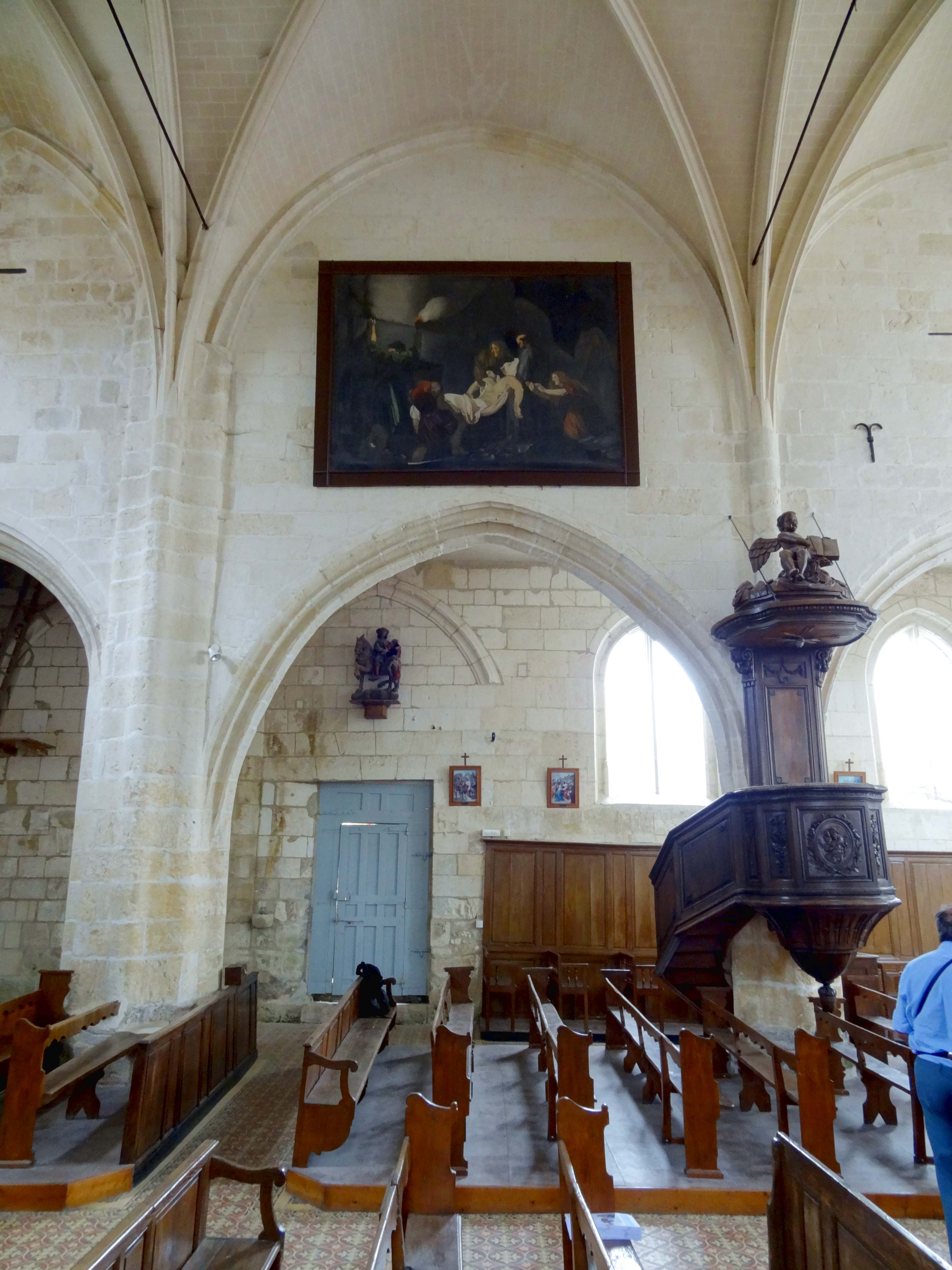 Intérieur de l'église - voir titre.